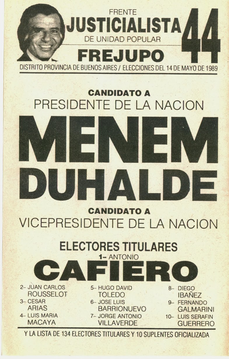 Boleta usada en la Provincia de Buenos Aires en las elecciones presidenciales argentinas de 1989